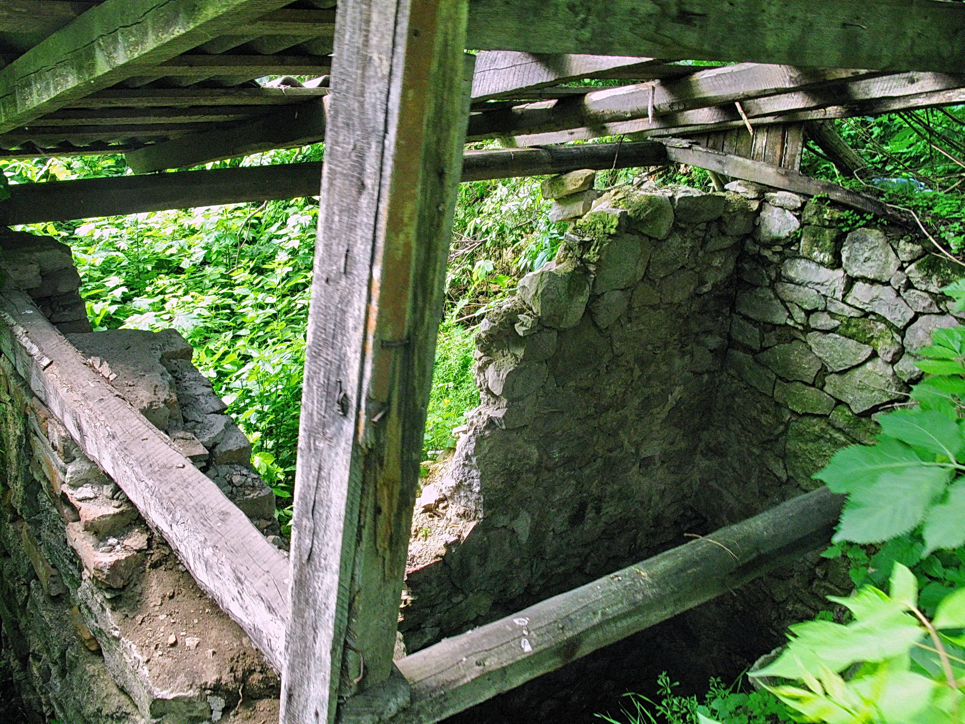 Руїни замку(мур.), Гримайлів